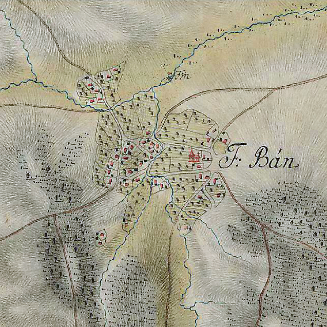 Harta Iosefină a Transilvaniei, 1769-1773, fragment: satul Ban în Sălaj.